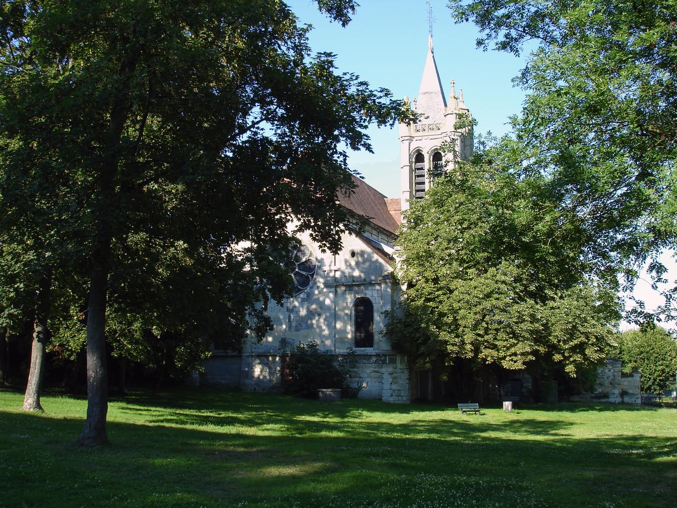 L'église Saint-Pierre-Saint-Paul à Goussainville (Val-d'Oise), France Le chevet vu du parc Juillet 2007 Photo personnelle (own work) de Clicsouris